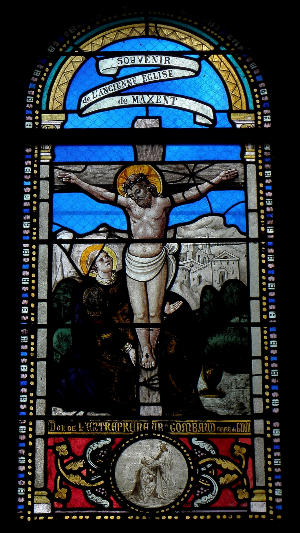 Vitrail classé de l'église Saint-Maxent de Maxent (35). Christ en Croix et Sainte-Marie-Madeleine.